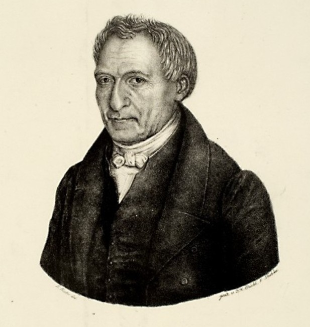 Ausschnitt aus einer Lithografie. Künstlerː Ernest Biéler. Dargestellte Personː Lorenz Diefenbach